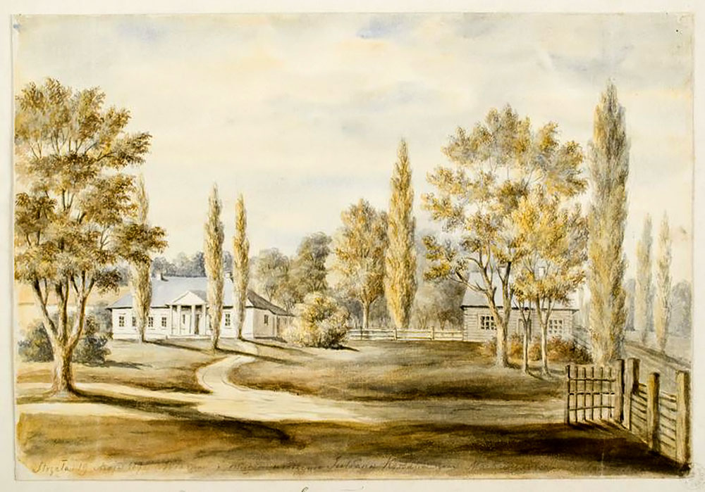 Беларуская (тарашкевіца): Страла (Strała), сядзіба Корсакаў (Korsak)